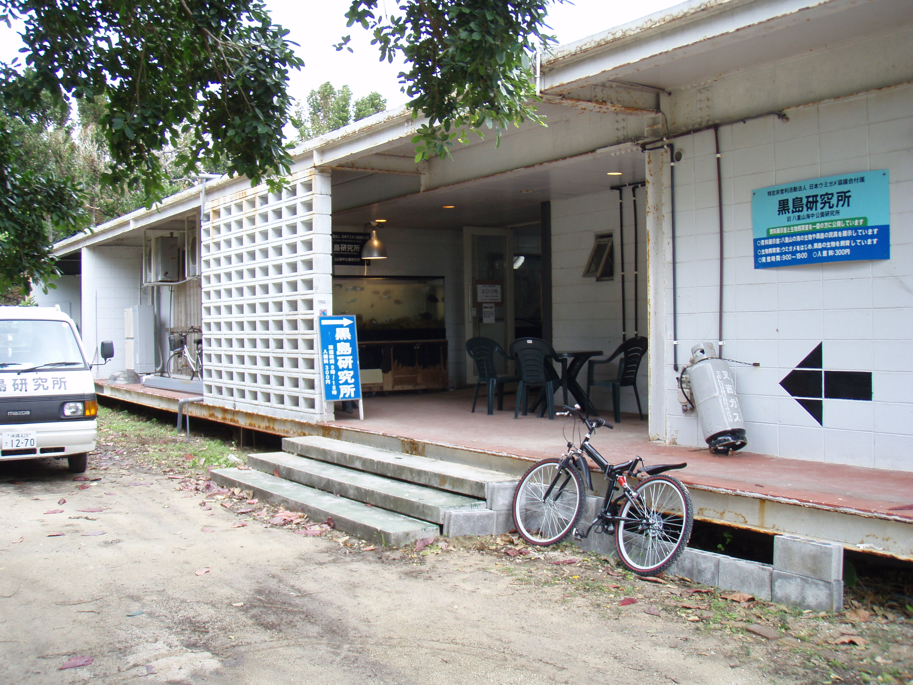 沖縄県八重山郡竹富町黒島にある旧八重山海中公園研究所の築30年余の建物.